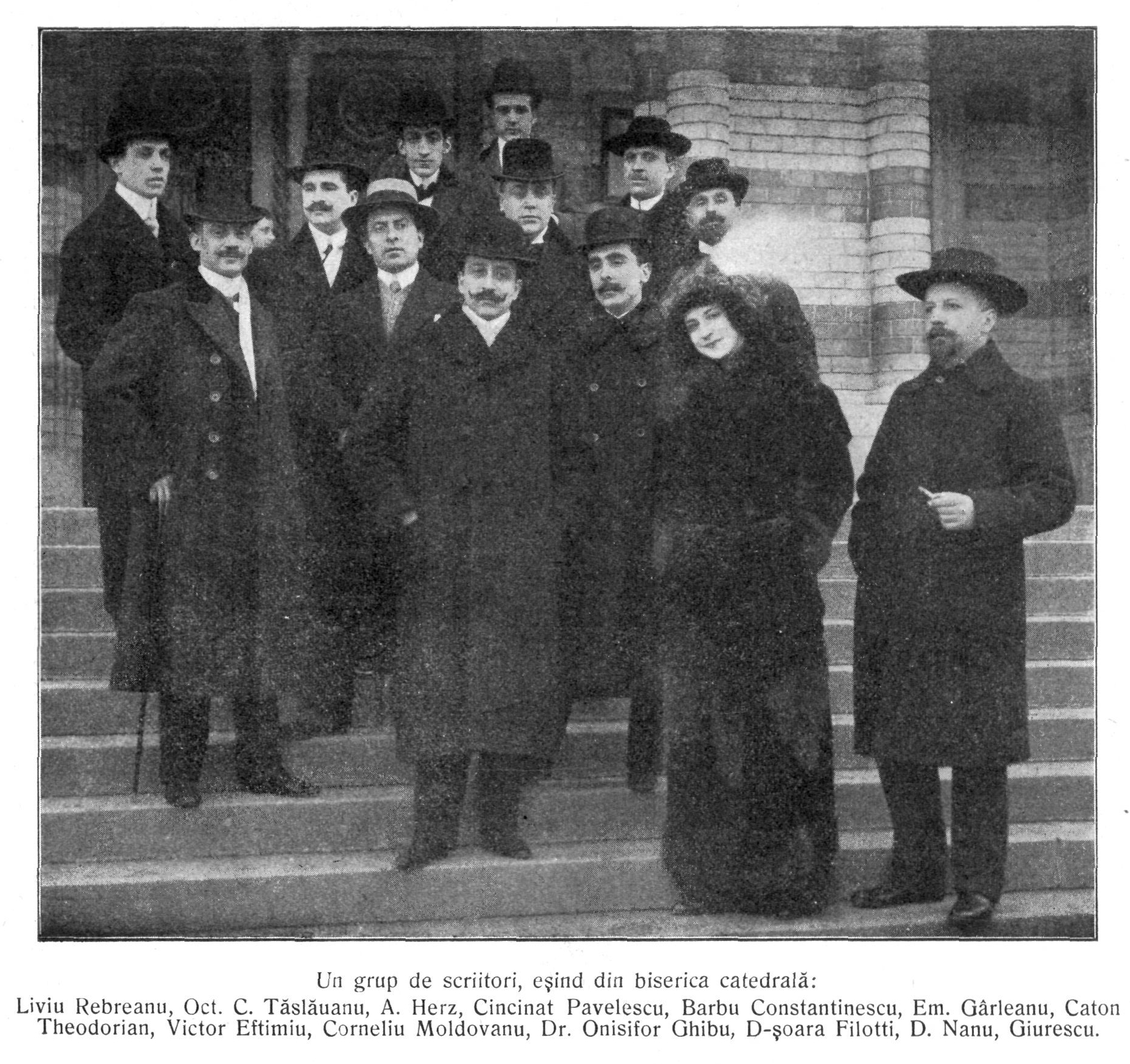 Un grup de scriitori, ieşind din biserica catedrală: Liviu Rebreanu, Octavian C. Tăslăuanu, A. de Herz, Cincinat Pavelescu, Barbu Constantinescu, Emil Gârleanu, Caton Theodorian, Victor Eftimiu, Corneliu Moldovanu, Dr. Onisifor Ghibu, D-şoara Filotti, Dumitru Nanu, Giurescu